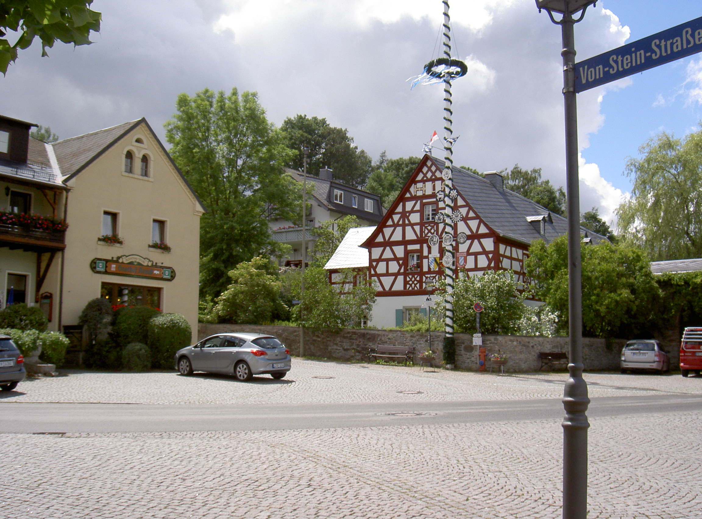 Joditz Schlegelweg 2